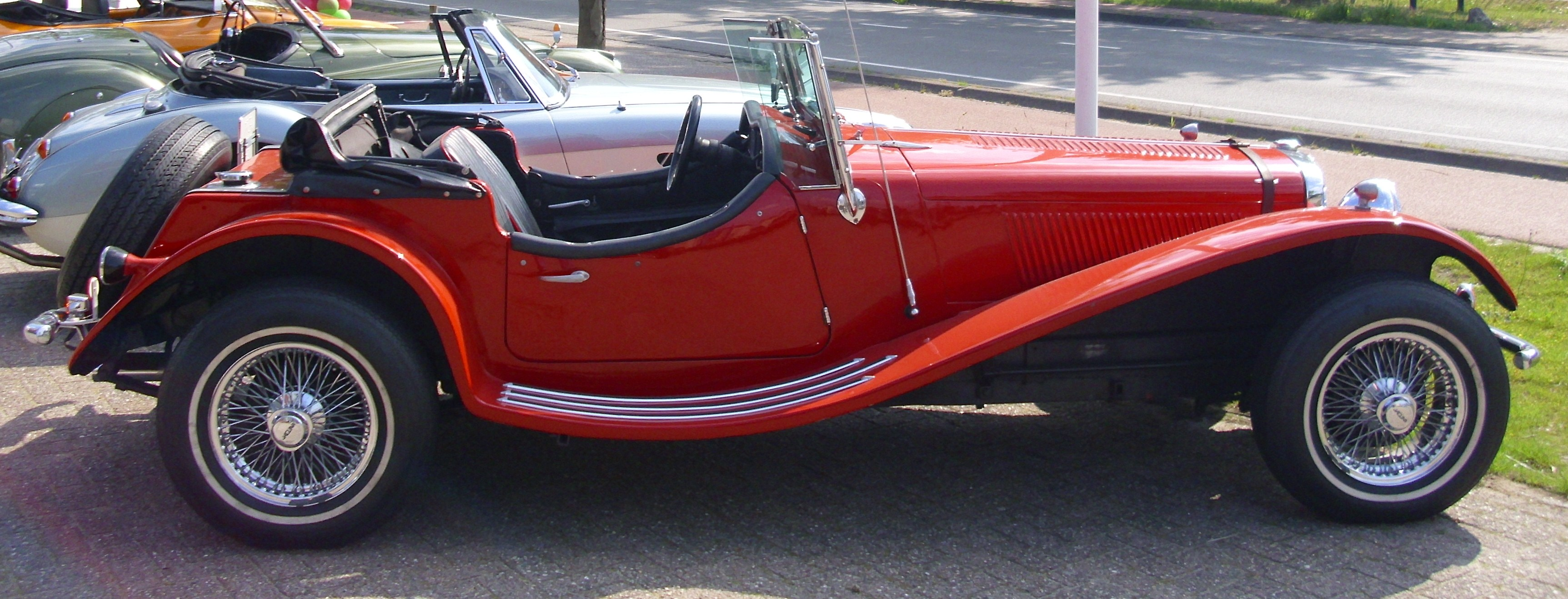 Intermeccanica Squire SS 100 Roadster 1973